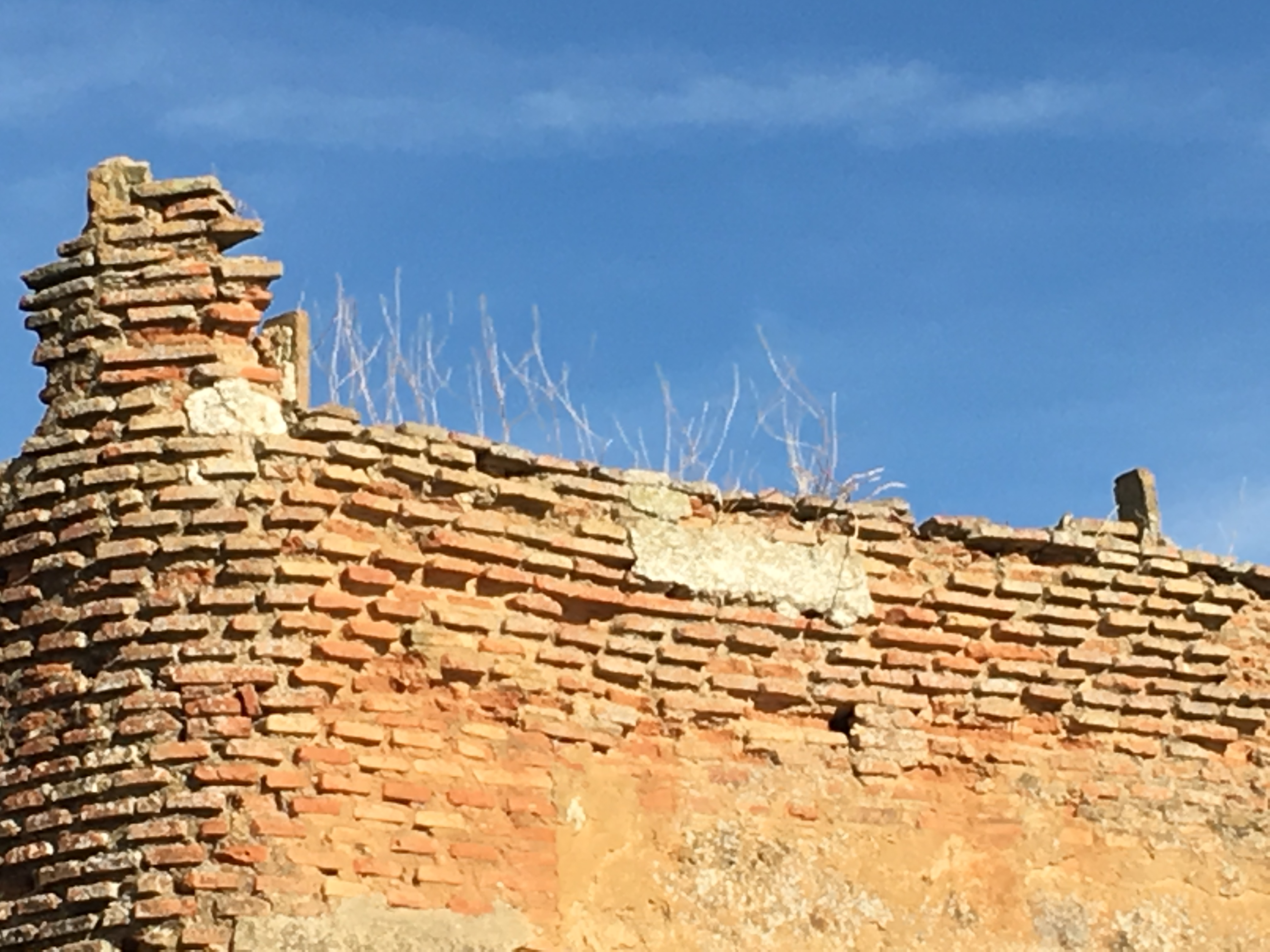 Villaesper Milenario